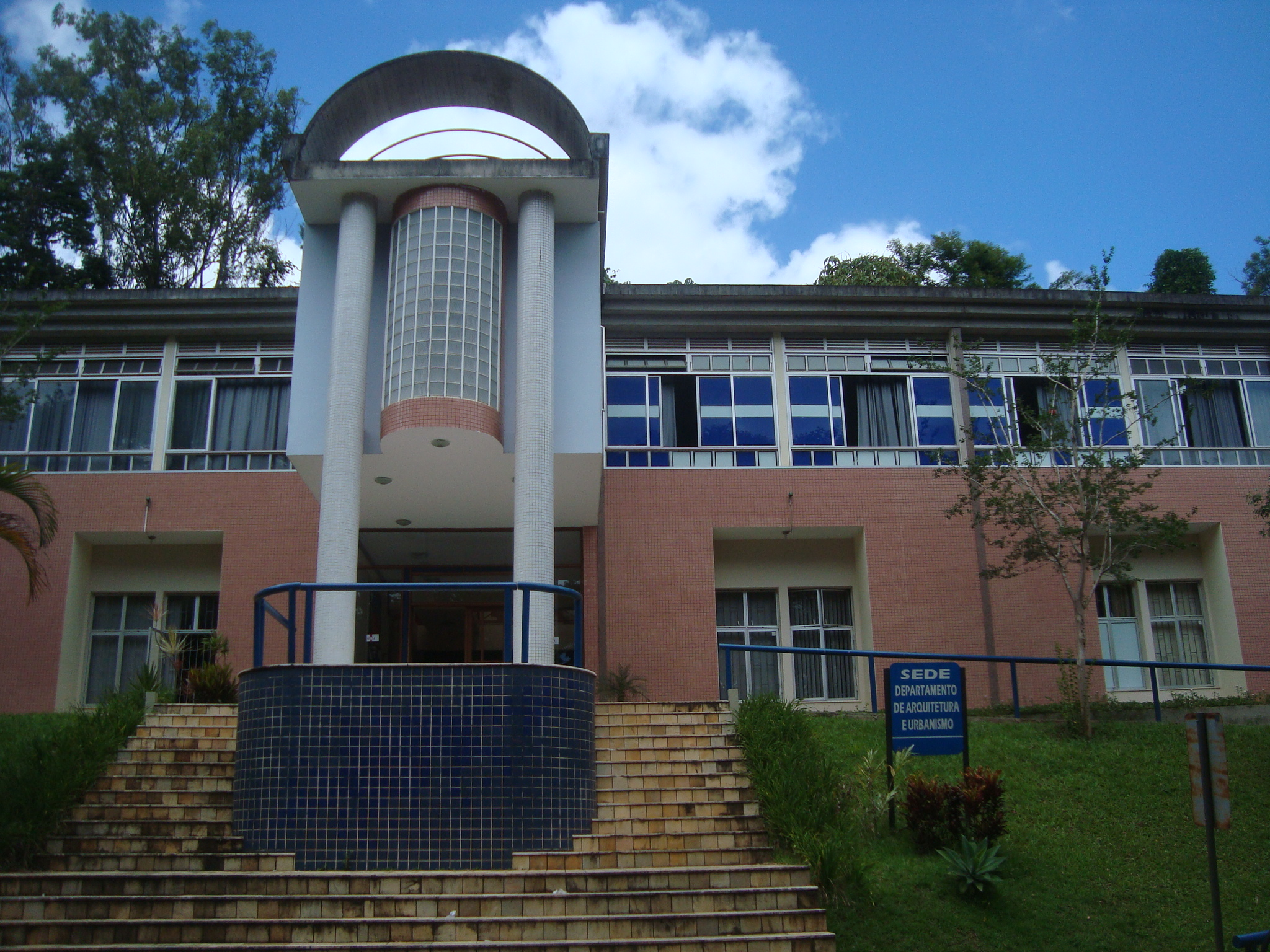 Edifício do Departamento de Arquitetura e Urbanismo da Universidade Federal de Viçosa, localizado no câmpus de Viçosa, Minas Gerais, Brasil